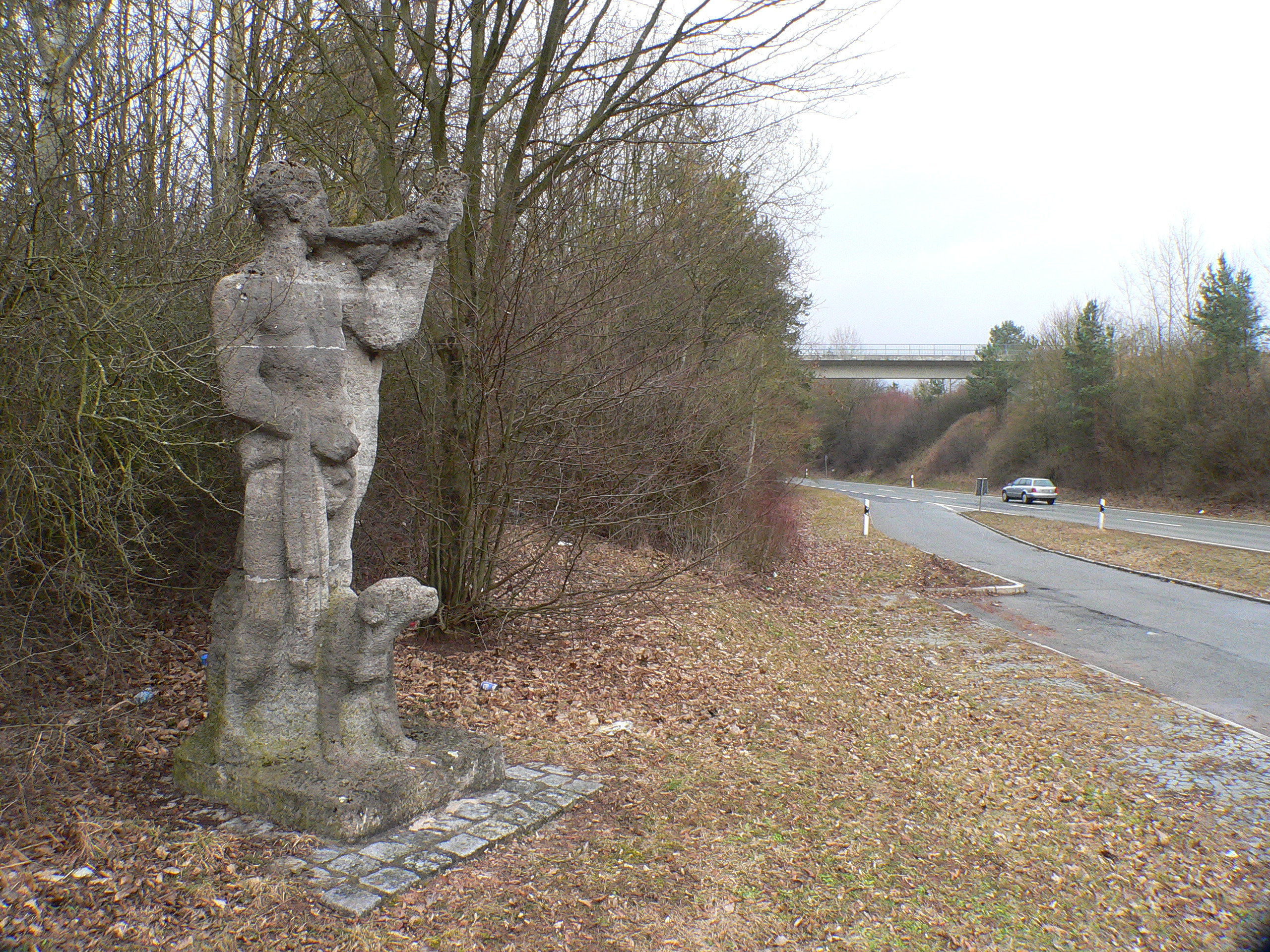 Kunst am Bau: Skulptur "Jäger mit Hund" an der Bundesstraße 303 auf dem Parkplatz Dietersdorf bei Seßlach (Bayern)